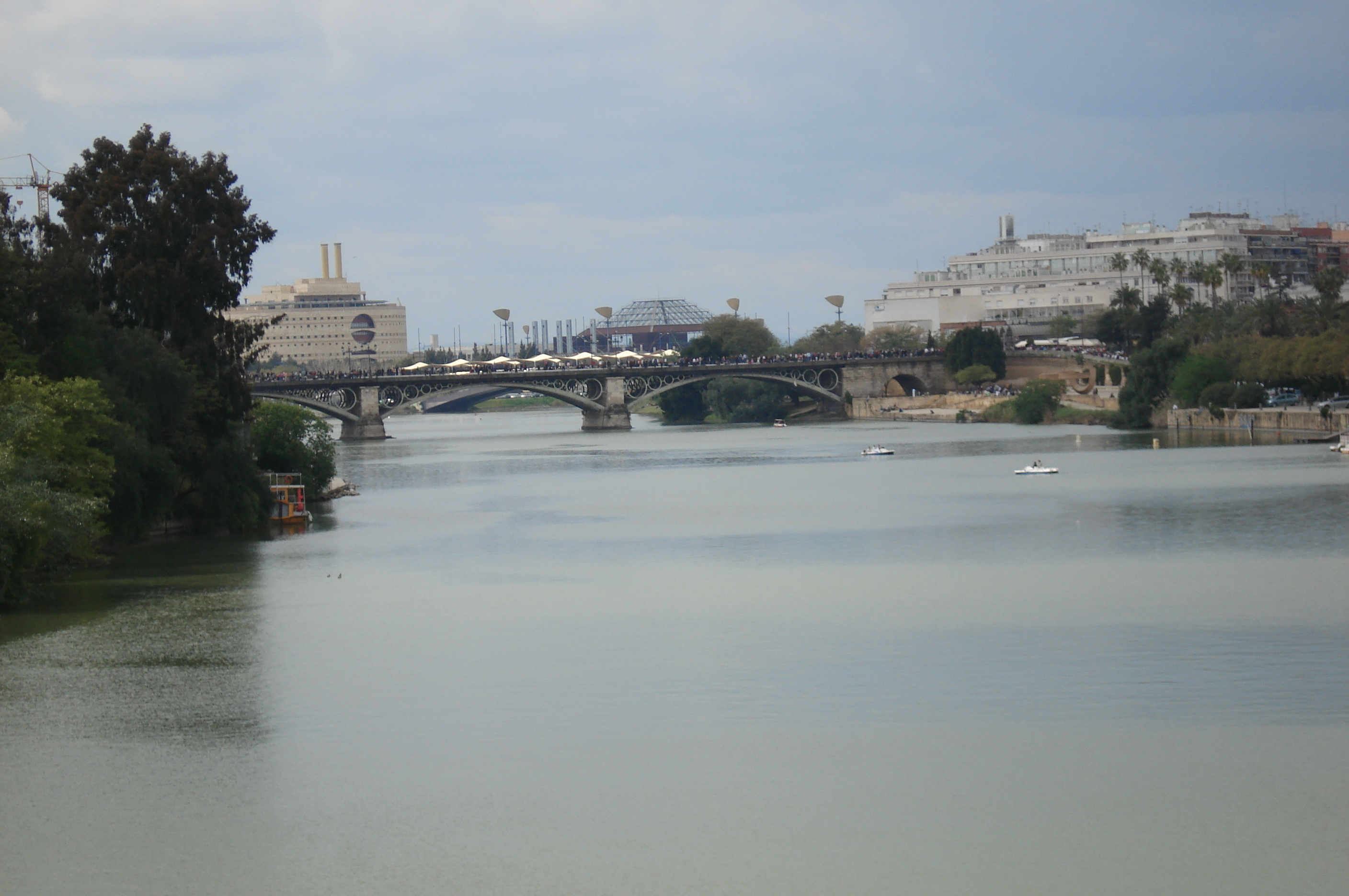 El río Guadalquivir a su paso por Sevilla. Al fondo, el puente de Triana y el Parque de la Expo 92.